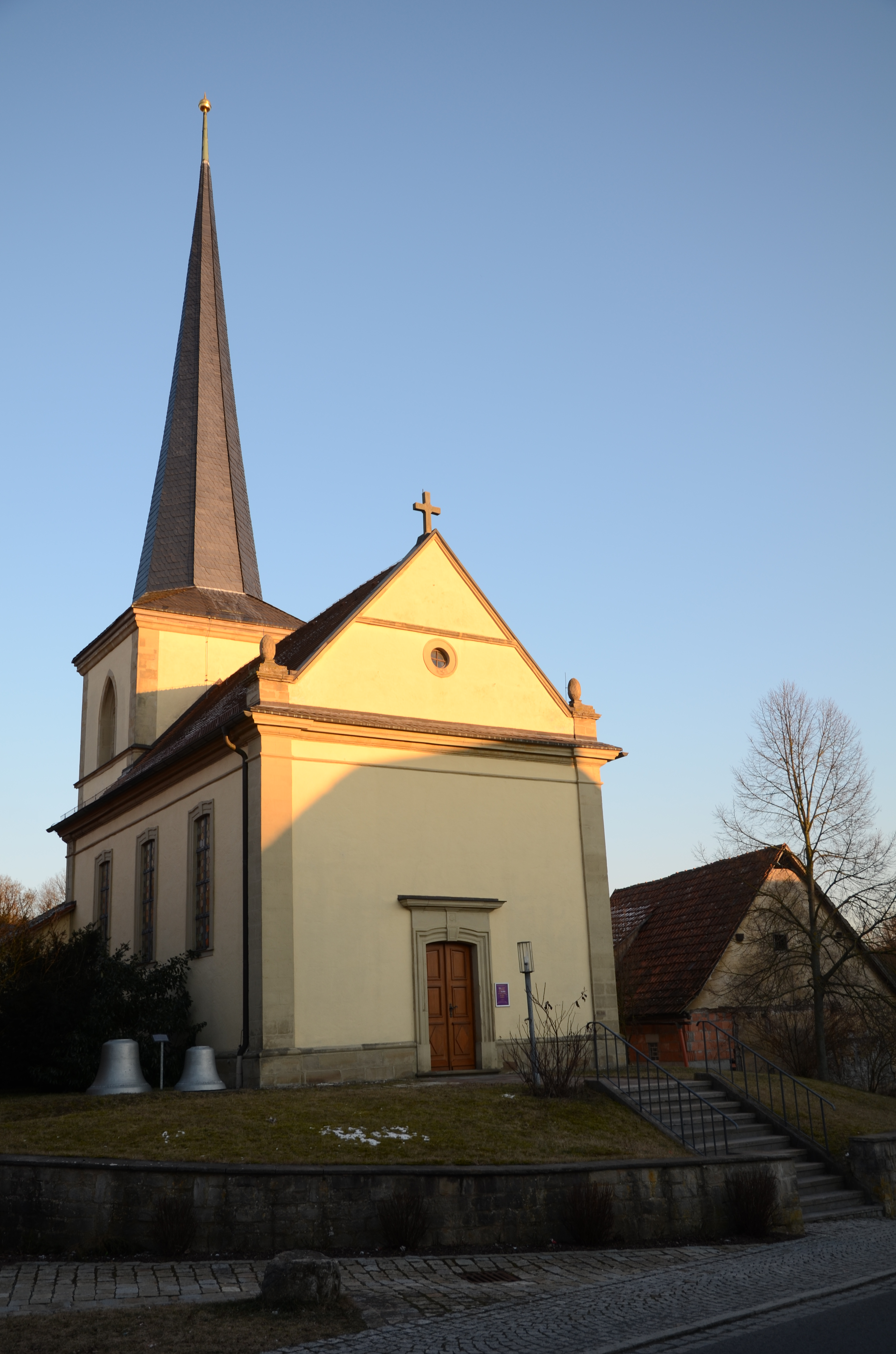 Evang.-Luth. Kirche in Rothhausen